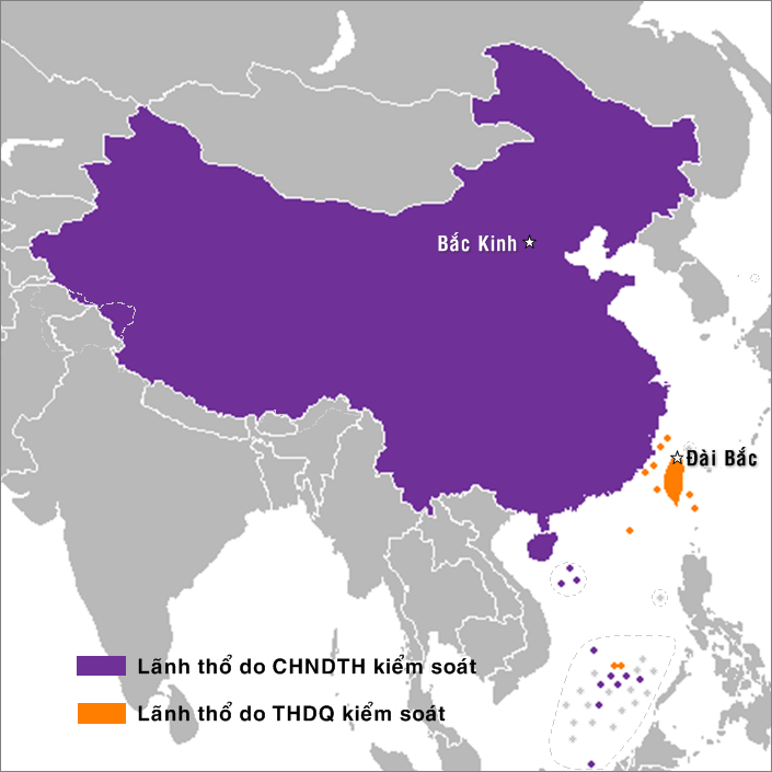 Hai nước Trung Quốc